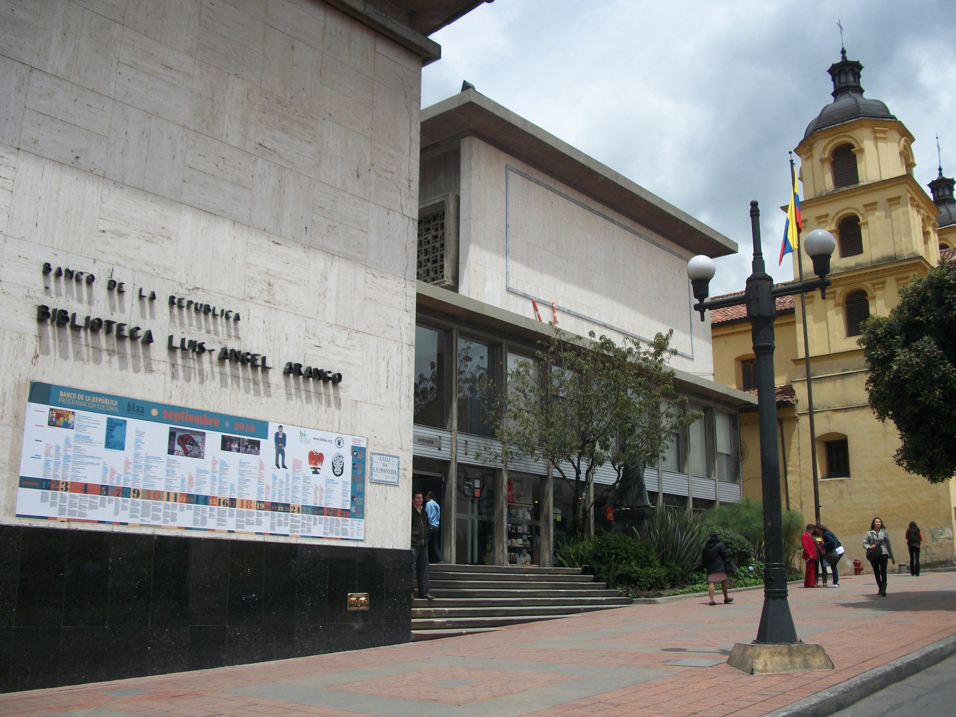 Entrada de la Biblioteca Luis Ángel Arango.